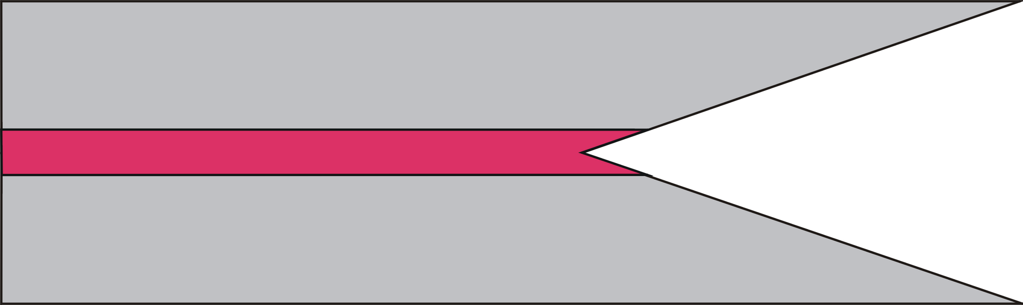 Barwy - proporczyk 1 Pułku Szwoleżerów Józefa Piłsudskiego